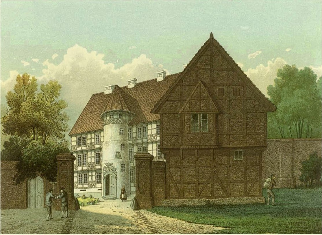 Salzwedel, Kreis Salzwedel, Lithografie aus dem 19. Jahrhundert